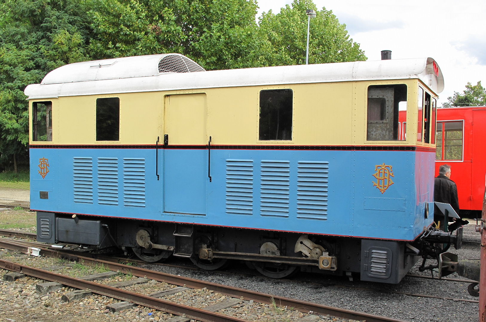 Le locotracteur Diesel N°LT1 Brissonneau et Lotz ex-Tramways des Deux-Sèvres, du Musée des tramways à vapeur et des chemins de fer secondaires français, à Butry-sur-Oise le 3 octobre 2010.